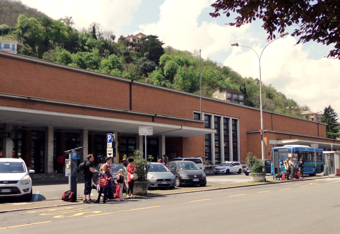 Stazione ferroviaria di Como San Giovanni.